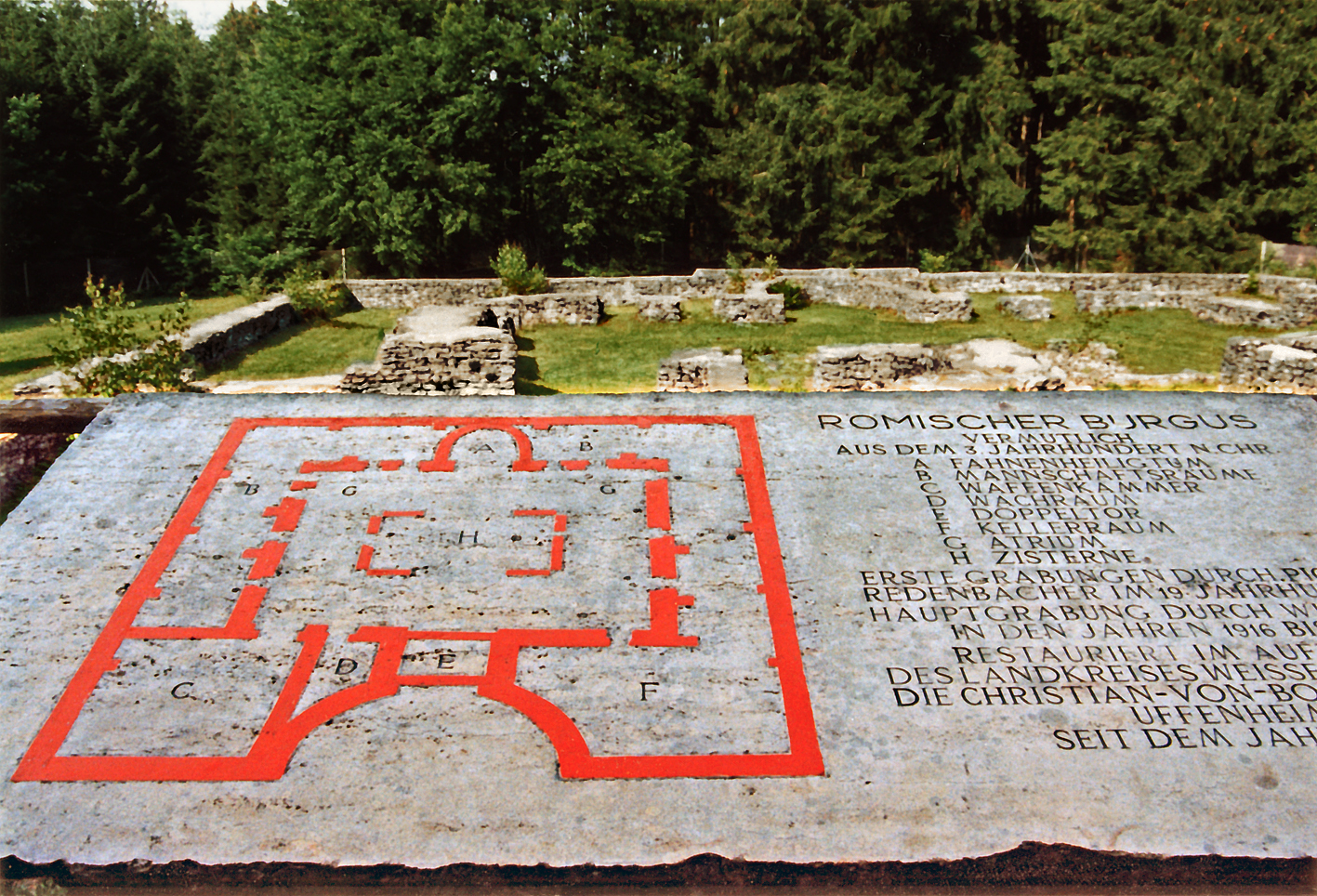 Das Kleinkastell „In der Harlach“ bei Burgsalach am bayerischen Limes wie es seit der Sicherung 1965 präsentiert wird. Zustand im August 1991.